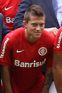 Visita da presidente Dilma Rousseff ao Beira-Rio (20 de fevereiro de 2014